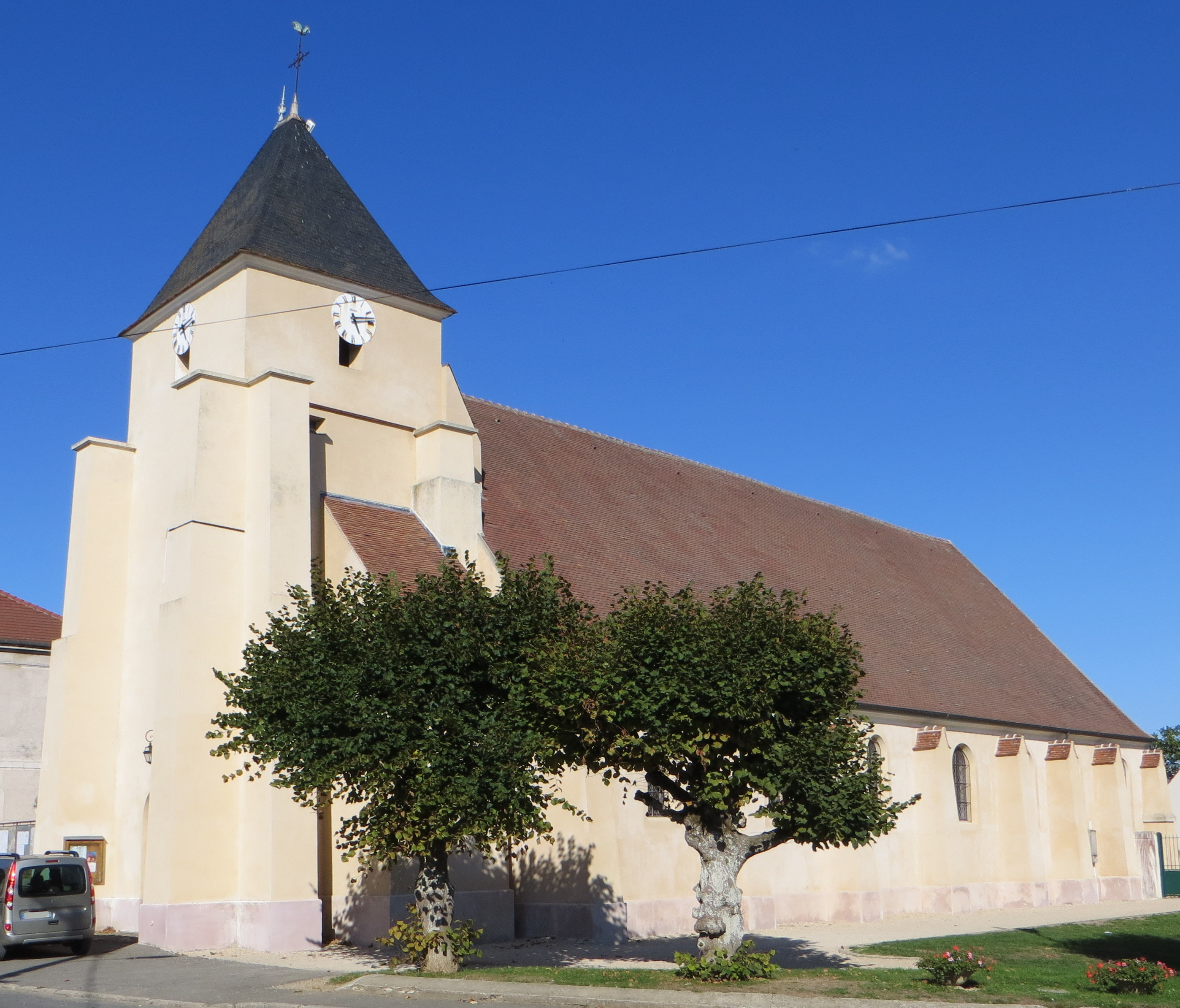 Vue générale de l'église